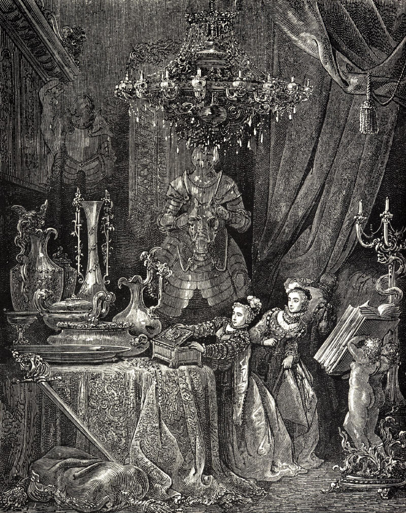 Illustration for Charles Perrault's La Barbe Bleue from Histoires ou Contes du Temps passé: Les Contes de ma Mère l'Oye(1697). Gustave Doré's illustrations appear in an 1867 edition entitled Les Contes de Perrault. Second of four engravings